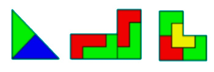 Trois modèles de reptuiles simples